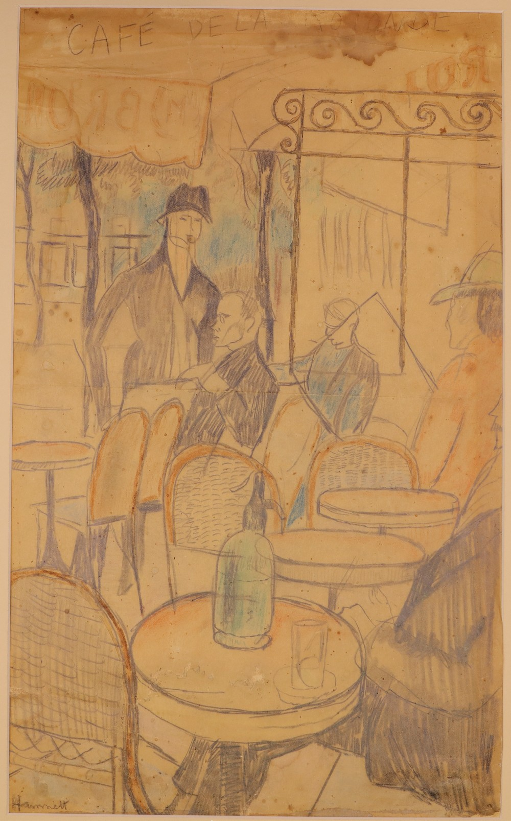 Н. Хэмнетт Café de la Rotonde Париж. Не позднее 1923 г. Бумага, карандаш. Дом русского зарубежья (Москва)